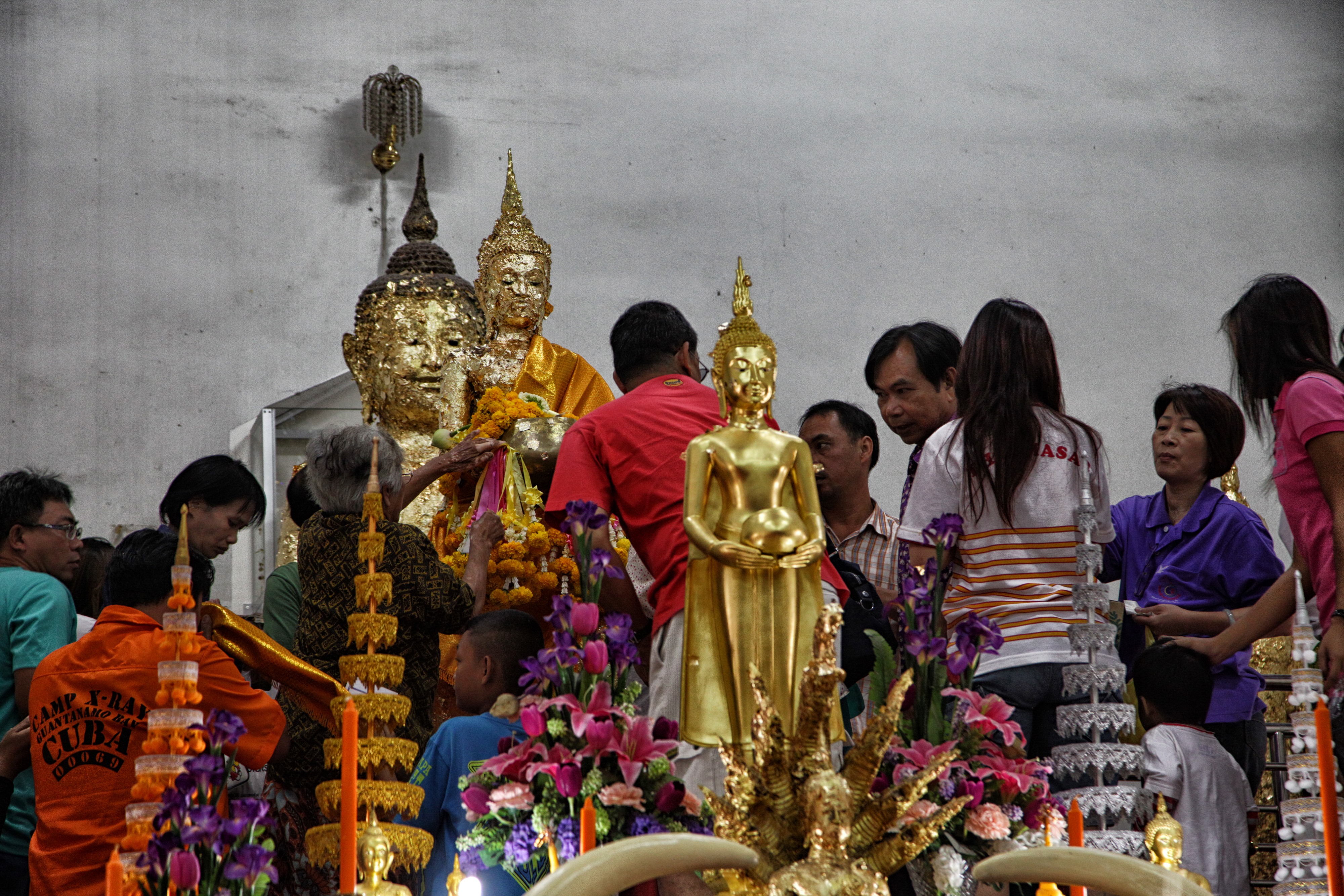 วัดบ้านแหลม(วัดเพชรสมุทรวรวิหาร)